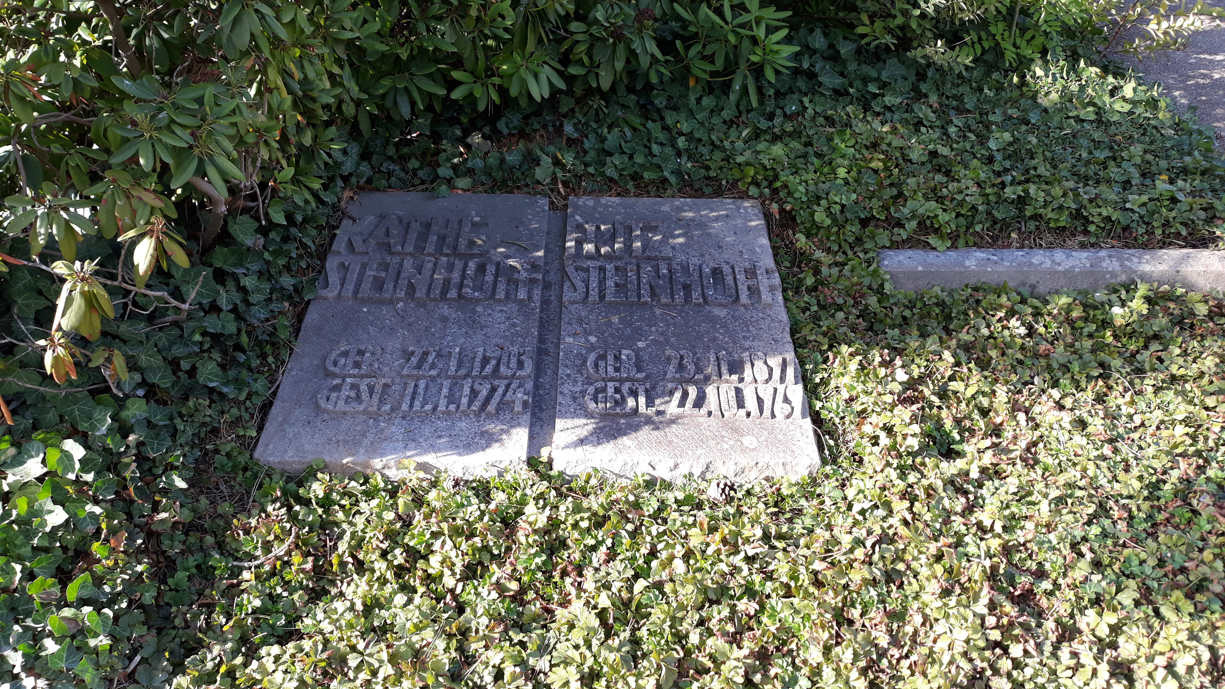 Das Grab des nordrhein-westfälischen Ministerpräsidenten Fritz Steinhoff und seiner Ehefrau Käthe auf dem Hauptfriedhof Iserlohn.